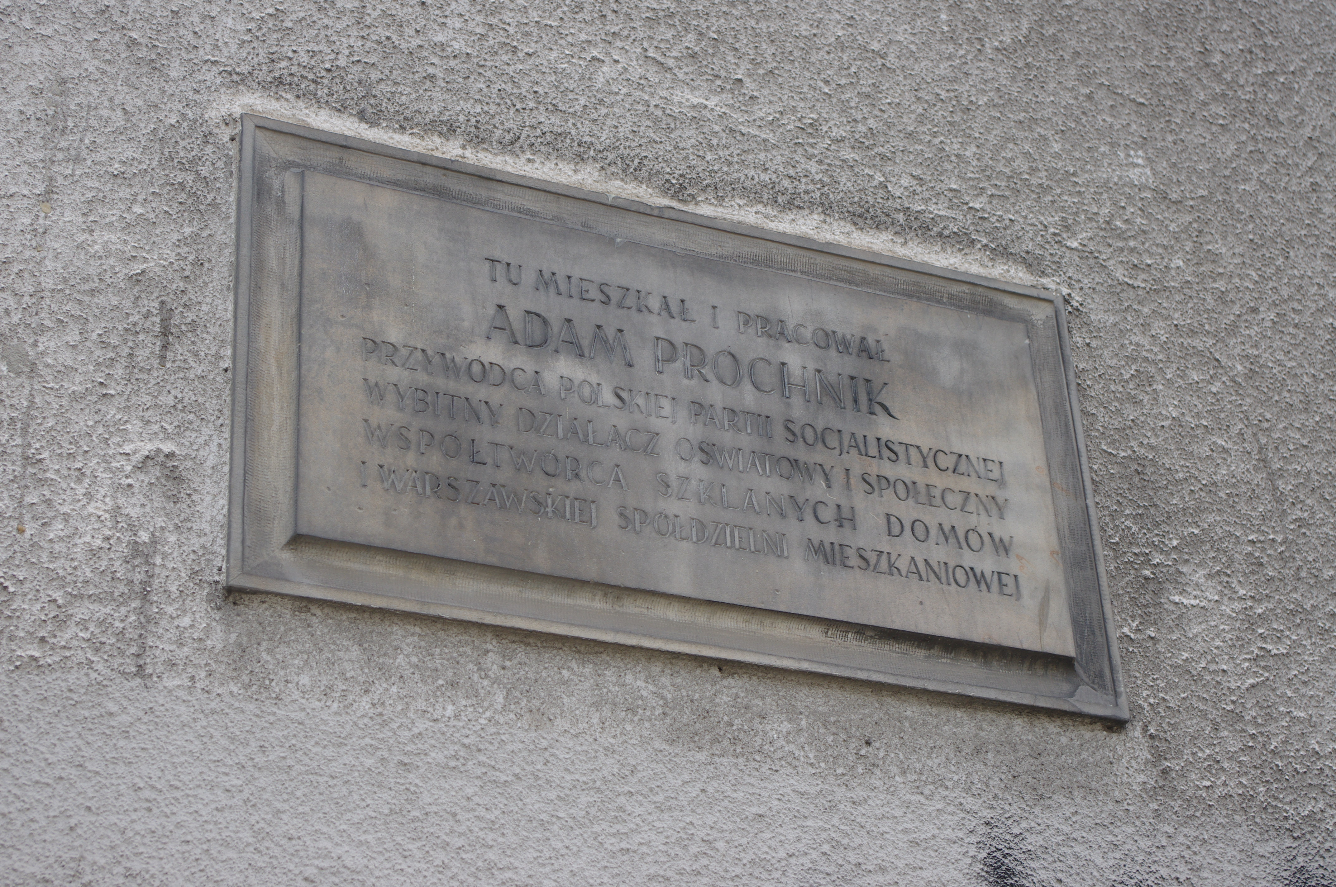 Tablica upamiętniająca polityka Adama Próchnika na budynku przy ul. Krasińskiego 18 na Starym Żoliborzu w Warszawie